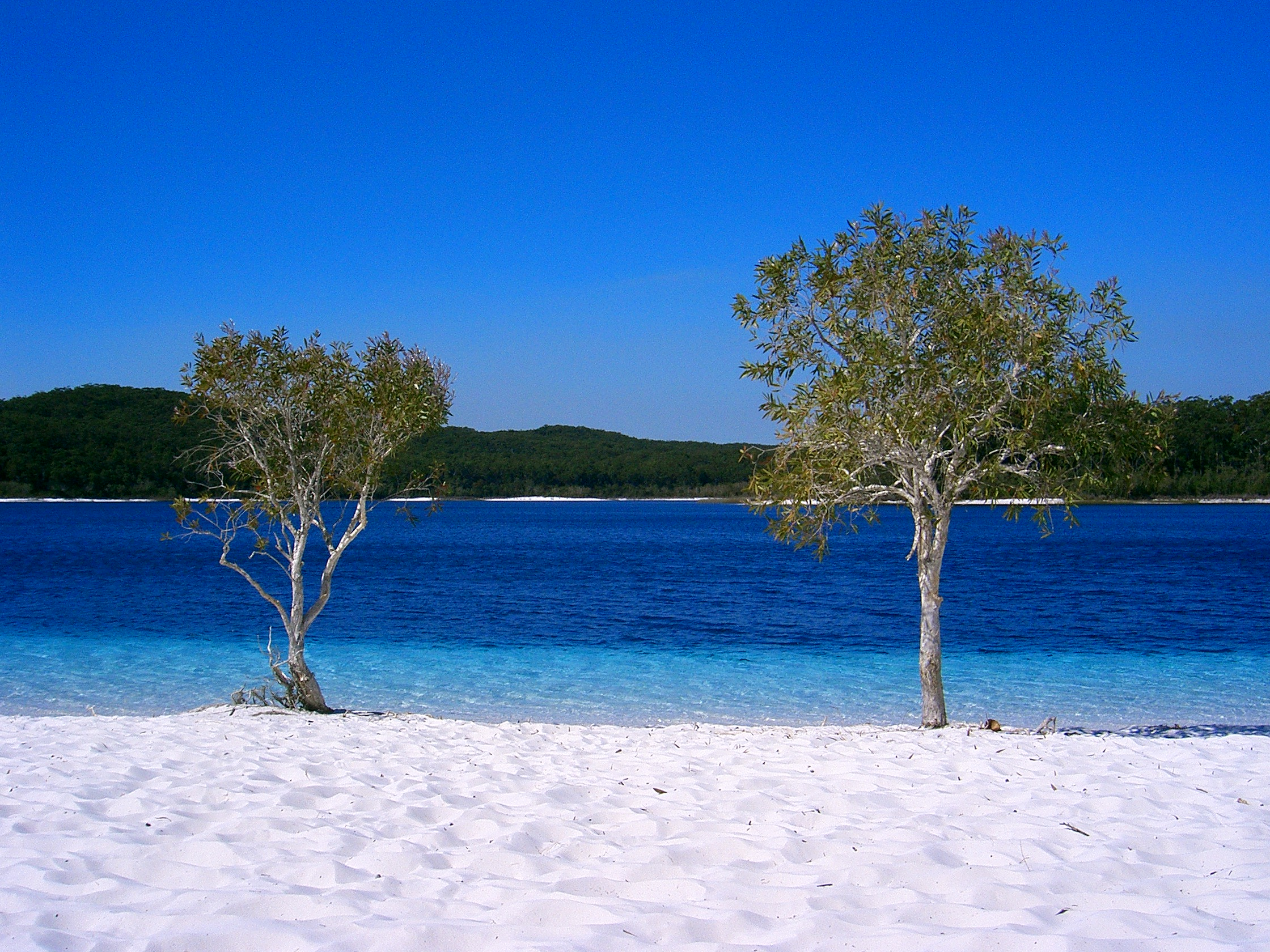 Lake McKenzie Beach, Fraser Island, Queensland, Australia